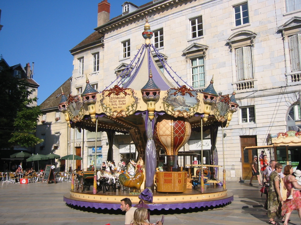 Caroussel de Besançon